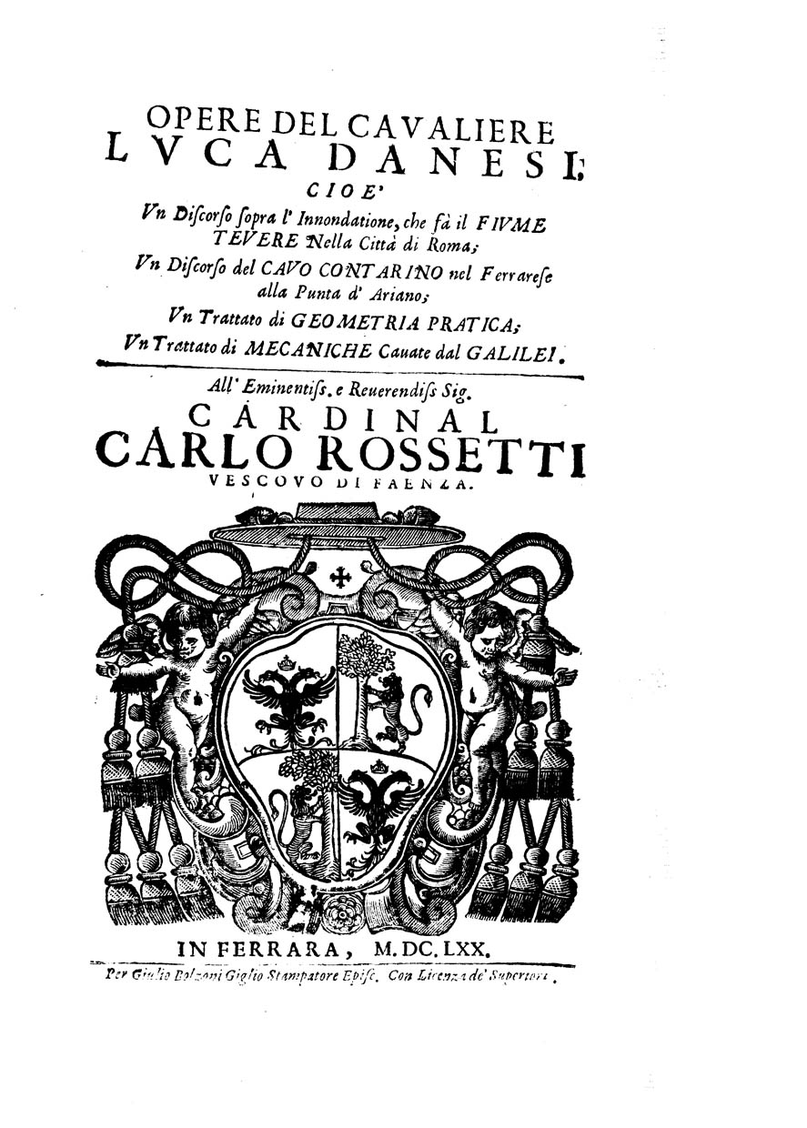 Opere del caualiere Luca Danesi. Cioè vn discorso sopra l'innondatione, che fà il fiume Teuere nella città di Roma; vn discorso del Cauo Contarino nel Ferrarese alla punta d'Ariano; vn trattato di geometria pratica; vn trattato di mecaniche cauate dal Galilei .... - In Ferrara : per Giulio Bolzoni Giglio stampatore episc., 1670. - [8], 33, [3], 15, [1], 74, [2], 67, [1] p. : ill. ; 2° . Frontespizio